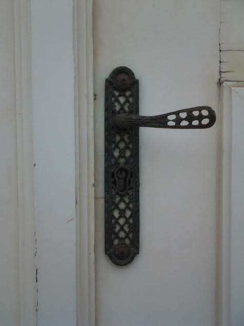 Huisserie extérieure de la double porte de gauche donnant sur la Place Royale